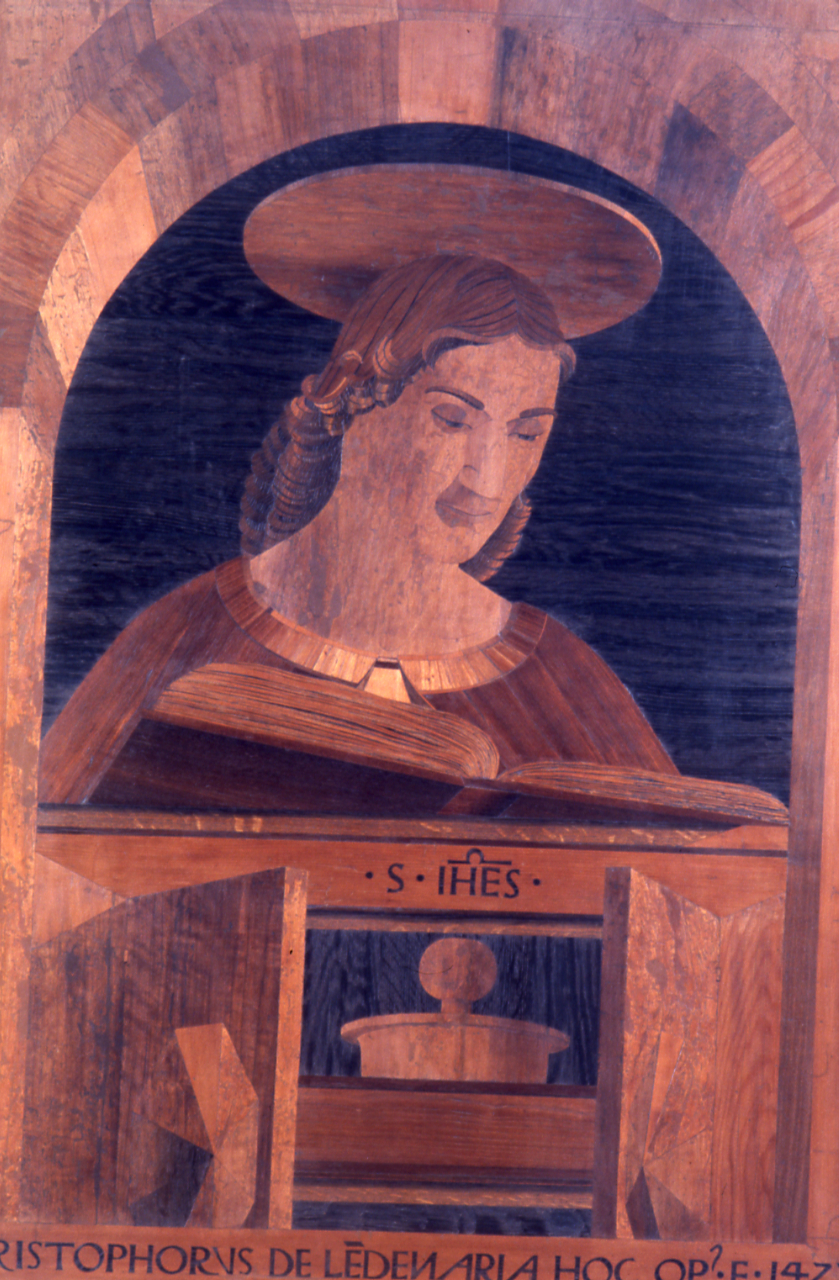 Servizio fotografico : Modena, 1974 / Paolo Monti. - Foglio: 1, Fotogrammi complessivi: 18/20 : Diapositiva, sviluppo cromogeno/ pellicola ; 35 mm. - ((Cartoncino manoscritto nella scatola contenente questa serie riportante: "Piero della Francesca. Tarsie evangelisti di Modena" . - Le diapositive nn. 19-20 costituiscono altre serie. - Tarsie ad opera di Cristoforo da Lendinara su disegno di Piero della Francesca. - Fonte: Rubrica di Paolo Monti: Diapositive 24x36mm (1948-1982), presso Archivio Paolo Monti. Rubrica con elenco soggetti e numeri di inventario (da 1 a 1000) corrispondenti ai fogli a tasche in pvc in cui sono contenute le diapositive.